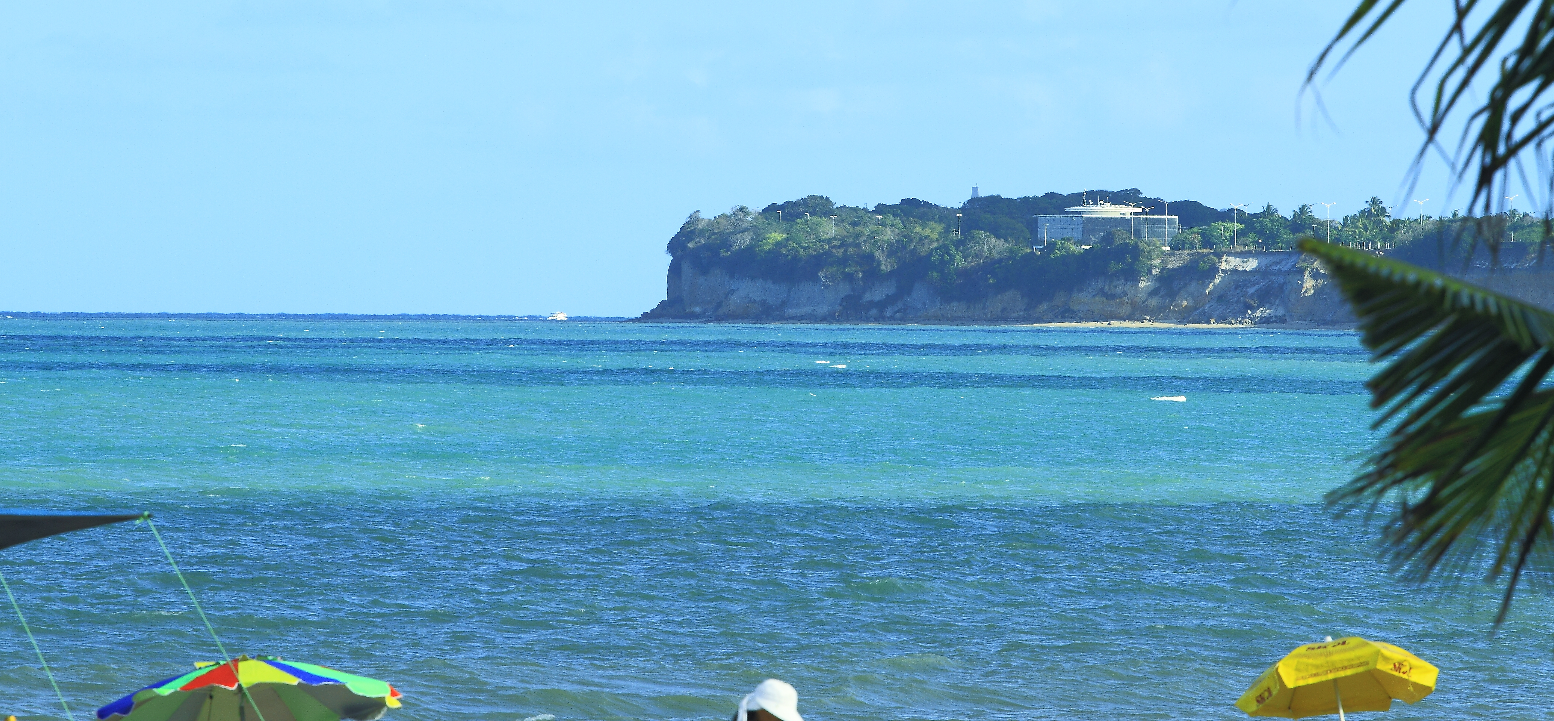 Praia da Ponta do Seixas e Estação Cabo Branco - João Pessoa, Paraíba, Brasil